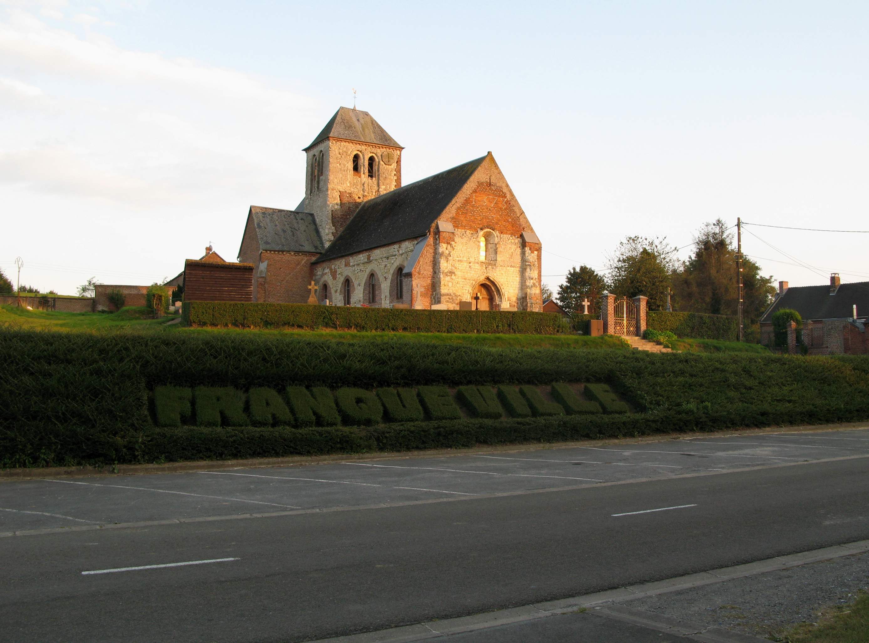 Franqueville (Aisne, France) - L'église fortifiée.